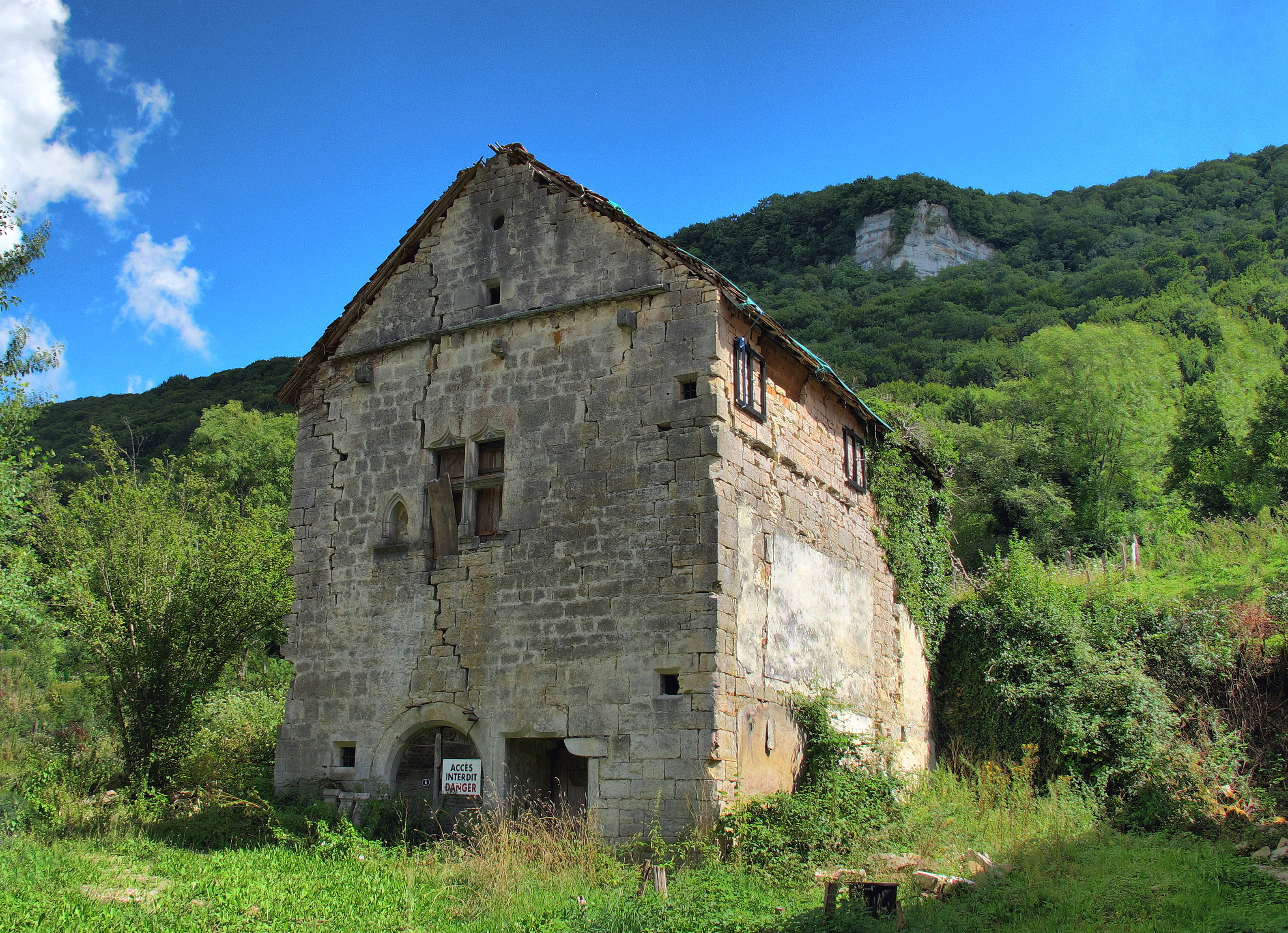 Inscrit aux monuments historiques sous le numéro PA25000073